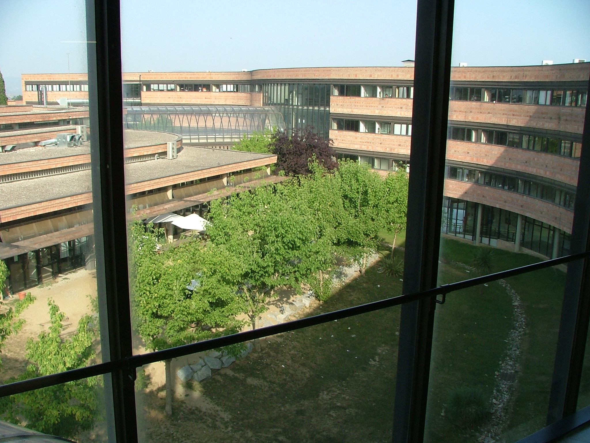 Facultat de Veterinaria,UAB Bellaterra,Barcelona,Catalonia,Spain